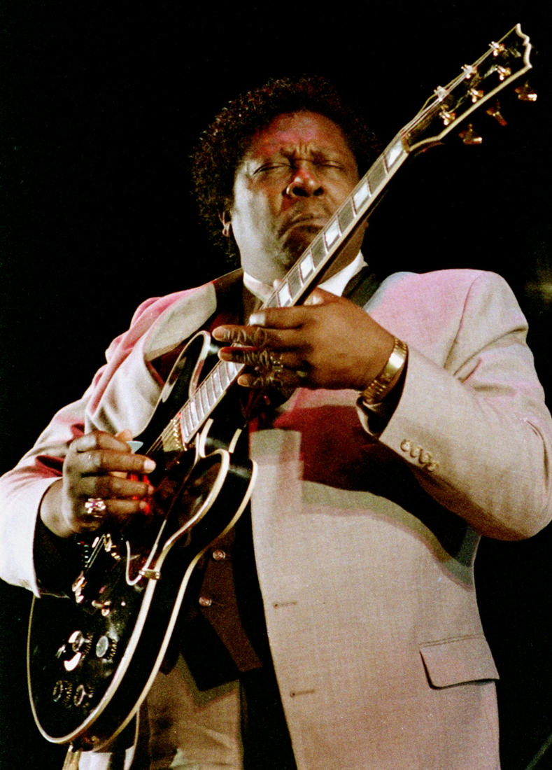 B.B. King in concert 05/07/1984 Roma 8° Jazz festival Pepito Pignatelli